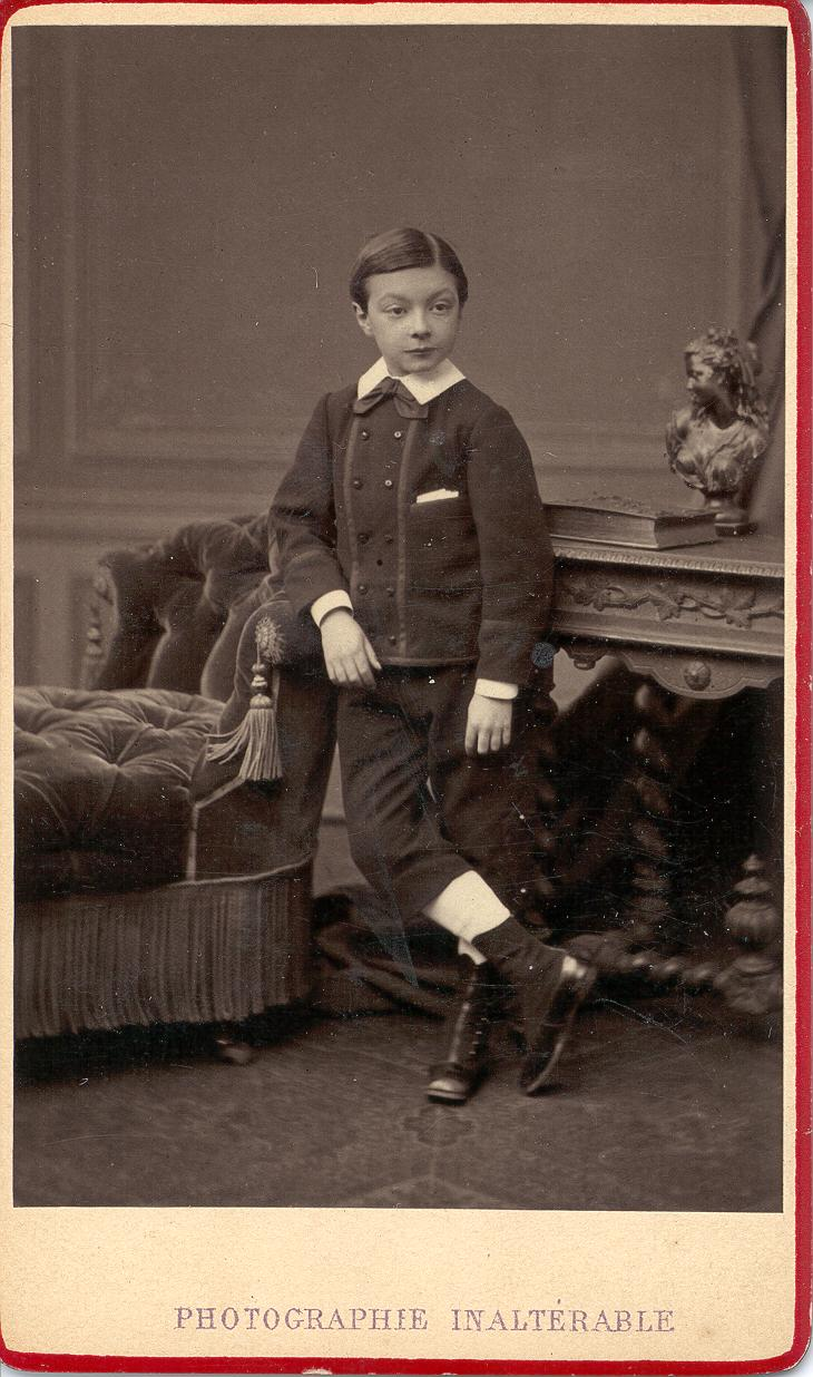 Photo de l'architecte Henri van Dievoet (1869-1931), enfant.